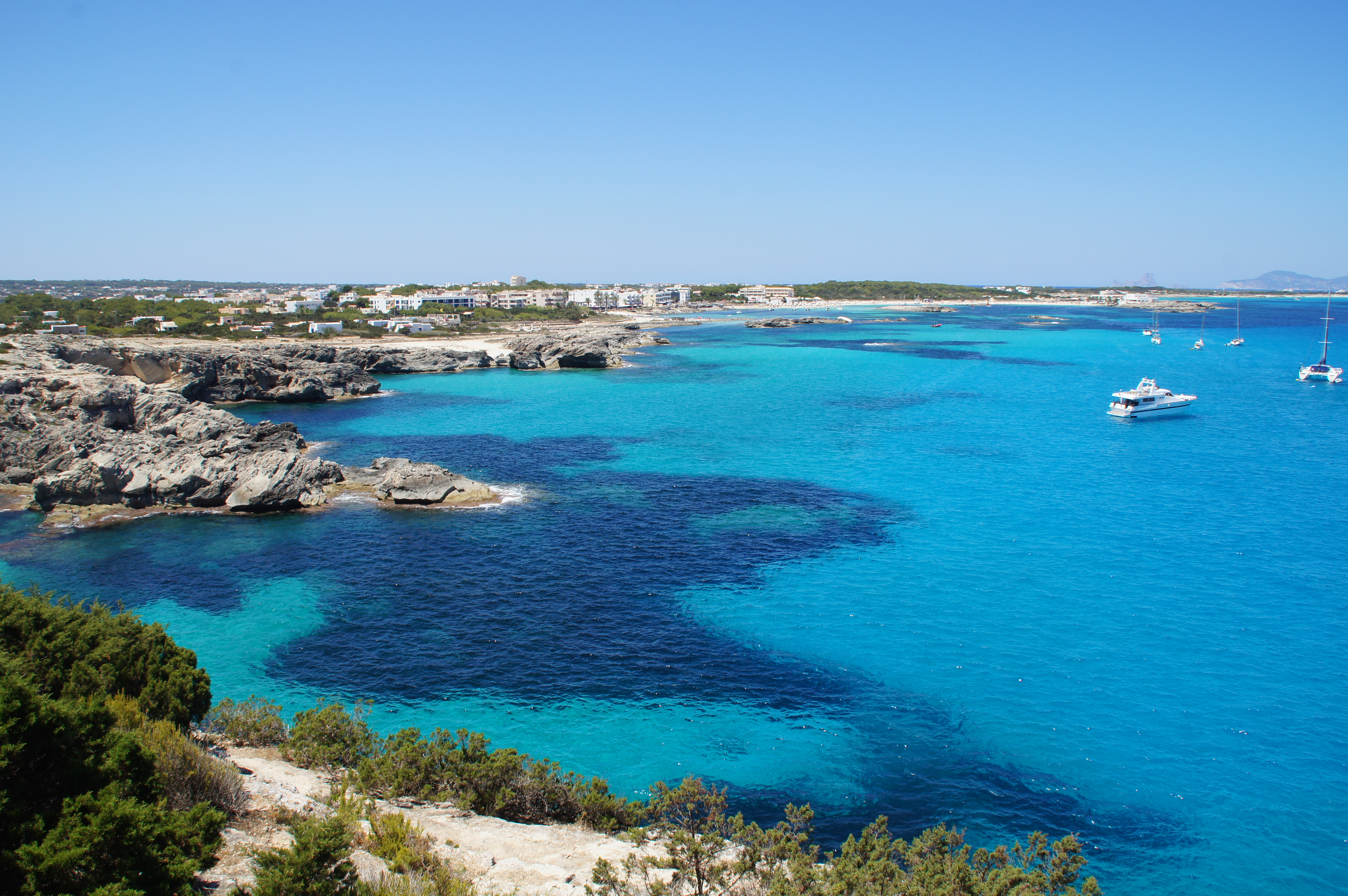 Formentera